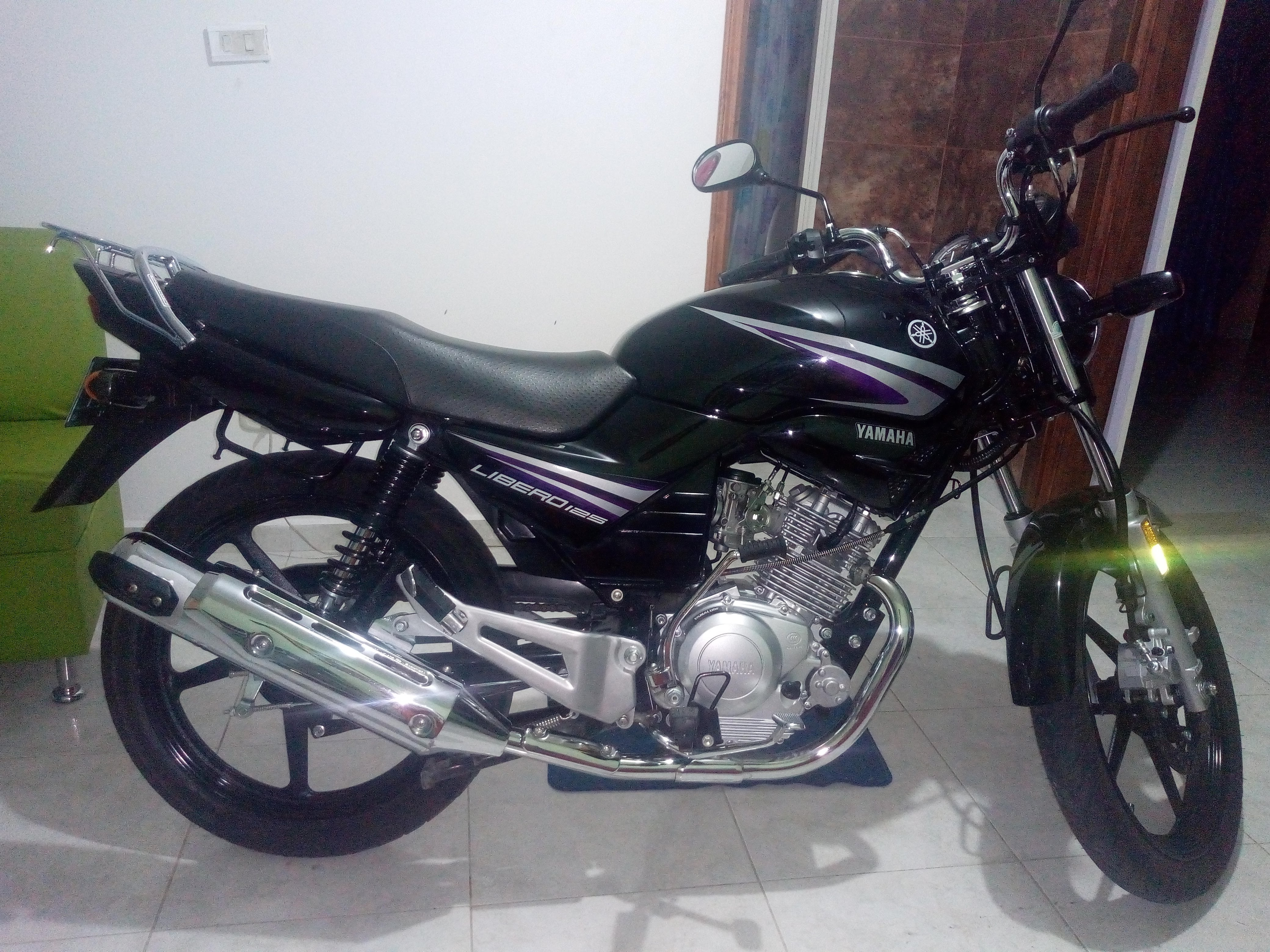 La Yamaha YBR ED en Colombia la comercializa Icolmotos bajo la denominación comercial de "Libero". Es una moto que es eficiente en factor costo beneficio y es usada tanto para desplazamiento como moto utilitaria.